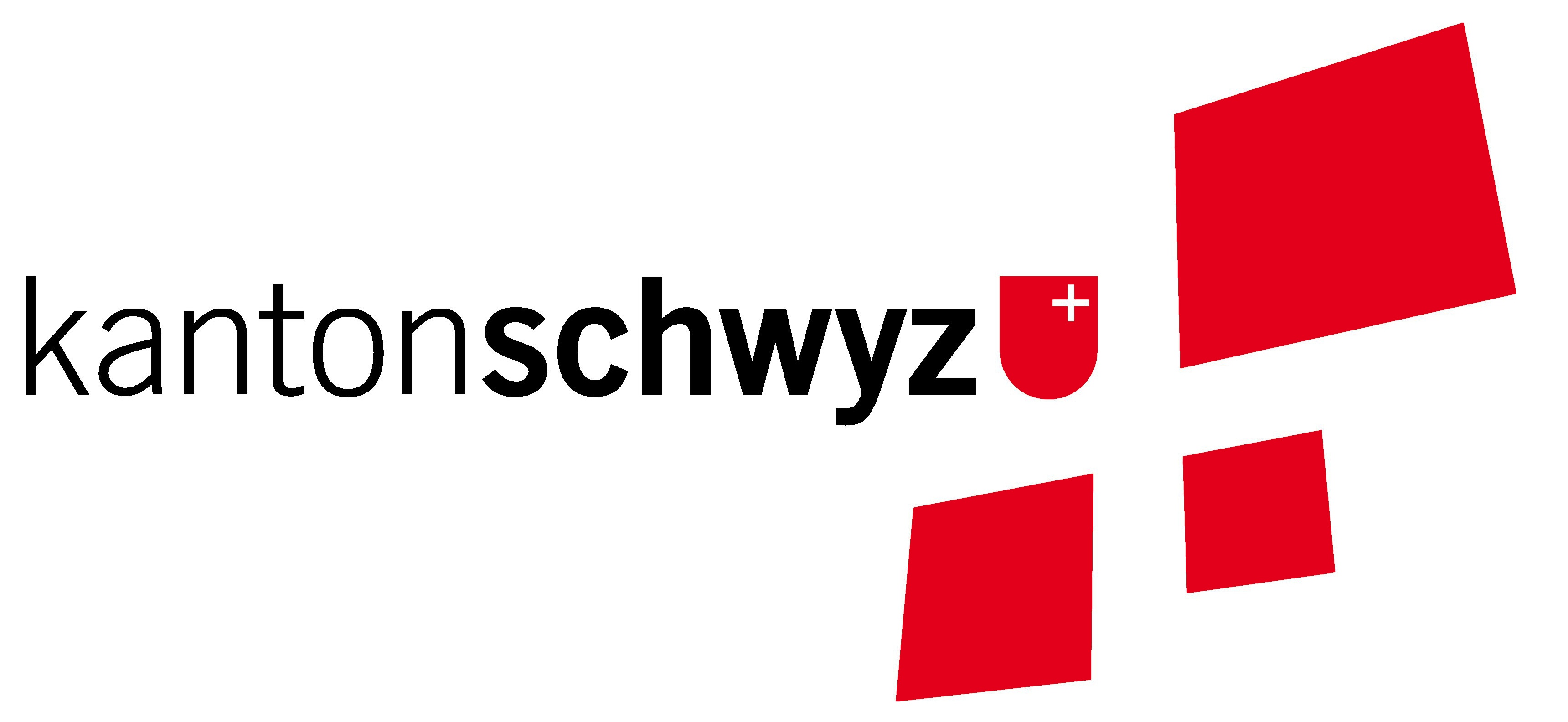 Logo der kantonalen Verwaltung des Kanton Schwyz: "Das Kantonswappen im Zentrum des Erkennungszeichens widerspiegelt das Traditionsbewusstsein der Schwyzer Bevölkerung. Die unterschiedlichen Bestandteile des Erkennungszeichens versinnbildlichen die landschaftliche, kulturelle, wirtschaftliche und politische Vielfalt des Kantons Schwyz. Das sich durch die Anordnung von Kantonswappen und Flächen ergebende grosse Kreuz steht für die Schweiz. Die neben dem Schwyzer Kantonswappen um das grosse Kreuz gruppierten drei Flächen stehen für die Sprachregionen unseres Landes." Dieses Logo wurde gegen den Widerstand eines "Komitee Logostop" nach einer Volksabstimmung vom 7. Dezember 1997 eingeführt. ""Das Komitee Logostop und einige tausend Schwyzerinnen und Schwyzer wehren sich vehement dagegen, dass unser Schwyzer Kantonswappen (Logo) verschandelt wird. Wir fordern, dass unser Schwyzer Kantonswappen, wie seit vielen hundert Jahren, bei allen Aktivitäten, nach innen wie nach aussen, in unveränderter Art in Erscheinung tritt.""